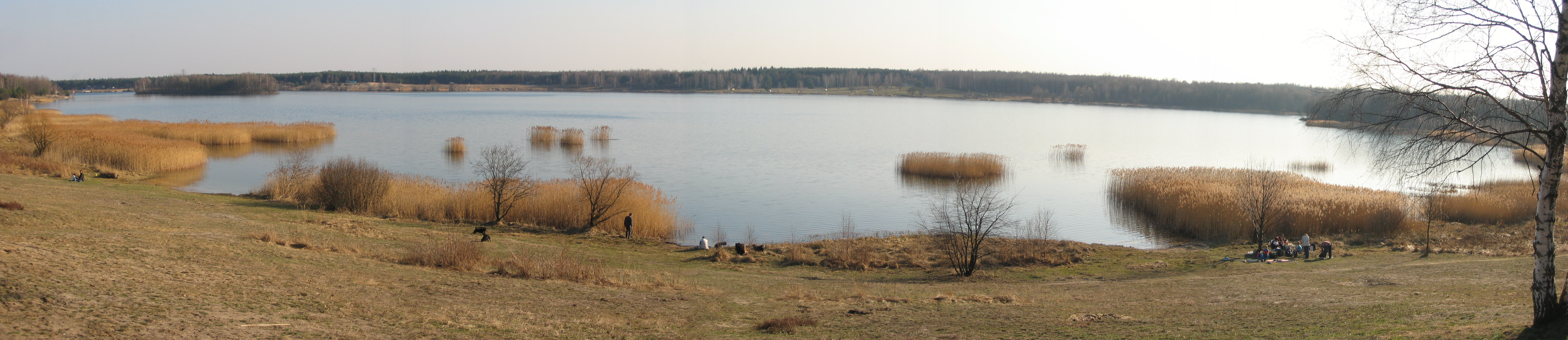 Świerklaniec - Zalew Chechło - zbiornik w wodny w powiecie tarnogórskim